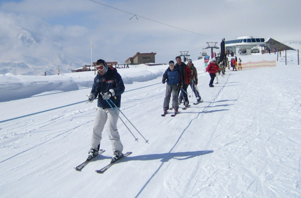 Telecorda al capdamunt de la Solaise (Val d'Isère, Savoia, França).